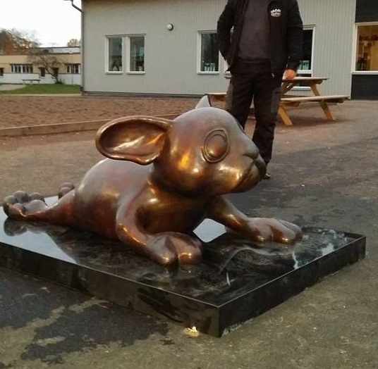 Skulpturen " Är inte alltid mä" utanför Dejeskolan